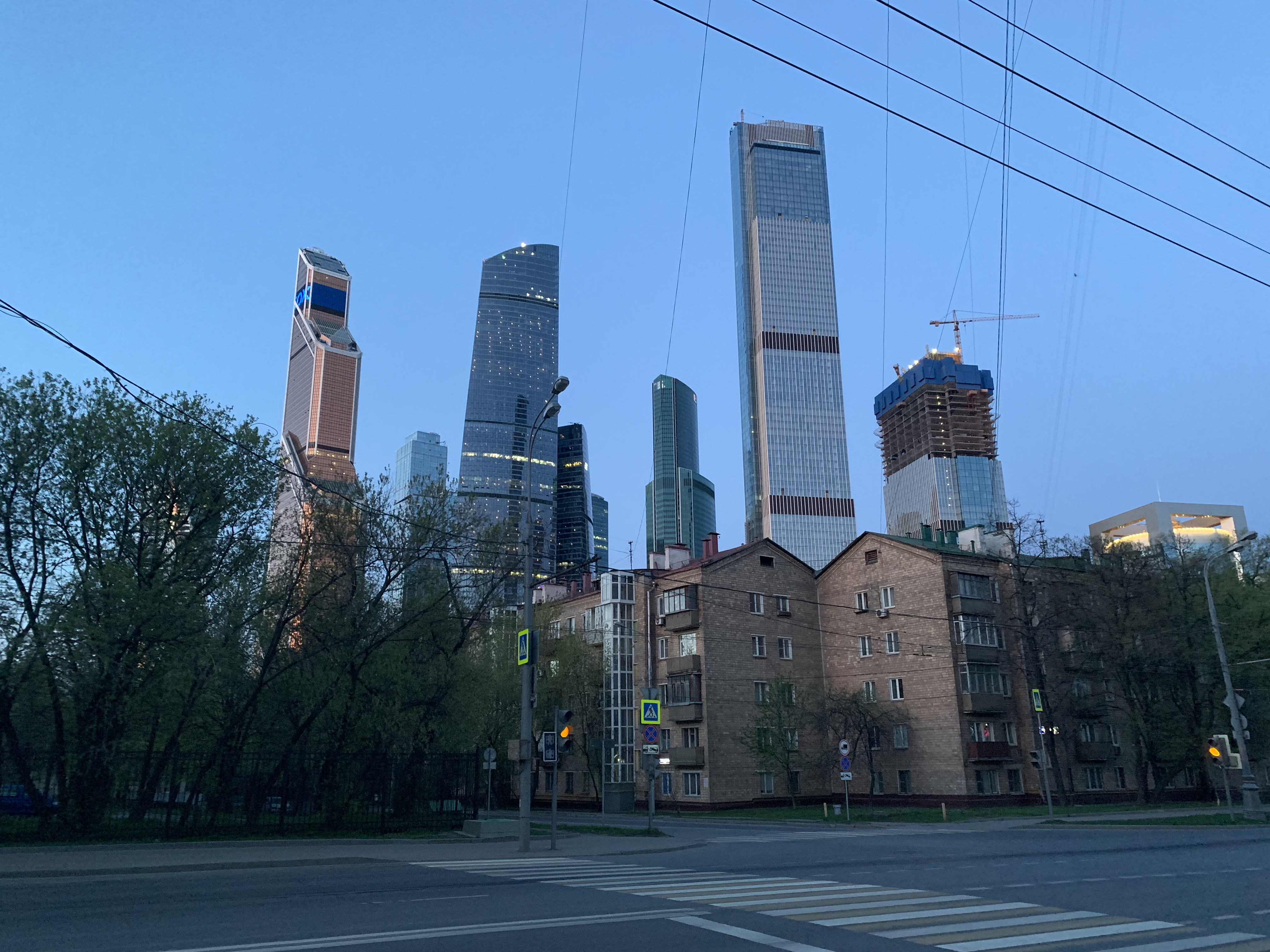 Москва-Сити с северной стороны за жилыми домами в утреннее время